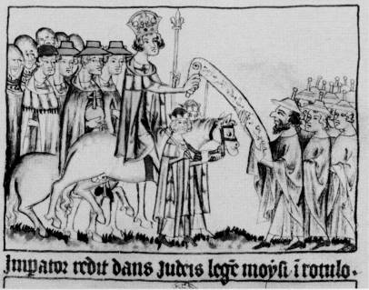 Der deutsche Kaiser Heinrich VII. und die Juden. Miniatur im "Codex Trevirensis", Trier, bis 1354. Koblenz, Landeshauptarchiv, Balduineum 1, bestimmt 1 C, Nr. 1, folio 24 recto. Bestätigung [des jüdischen] Gesetzes durch Heinrich VII. 1312 in Rom (...), wohl seine erste Amtshandlung als Kaiser nach der gerade vollzogenen Krönung. [Beschreibung zitiert nach Bildquelle]